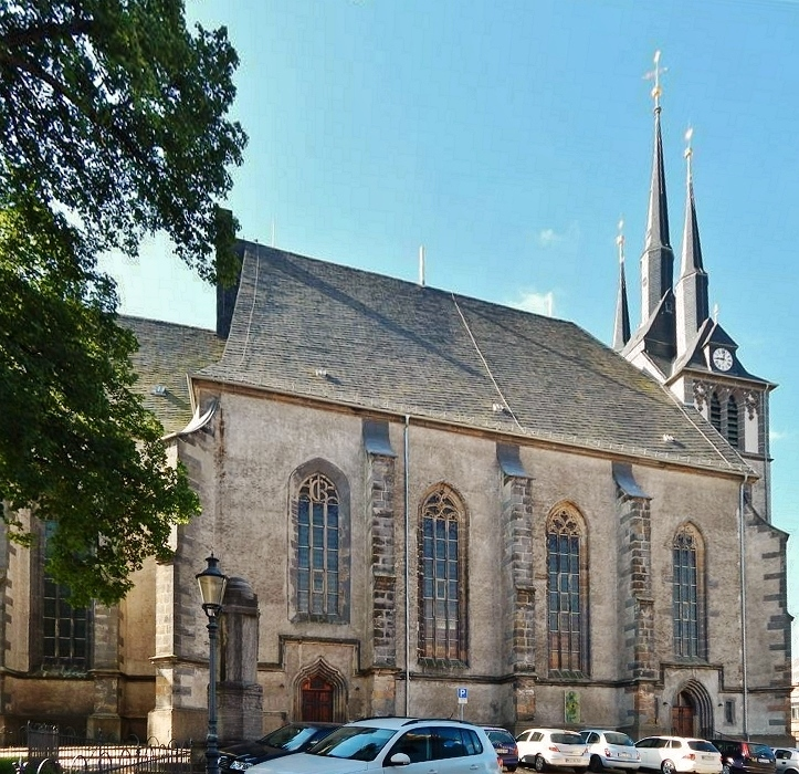 Die Lommatzscher Wenzels-Kirche,vom Marktgäßchen gesehen.